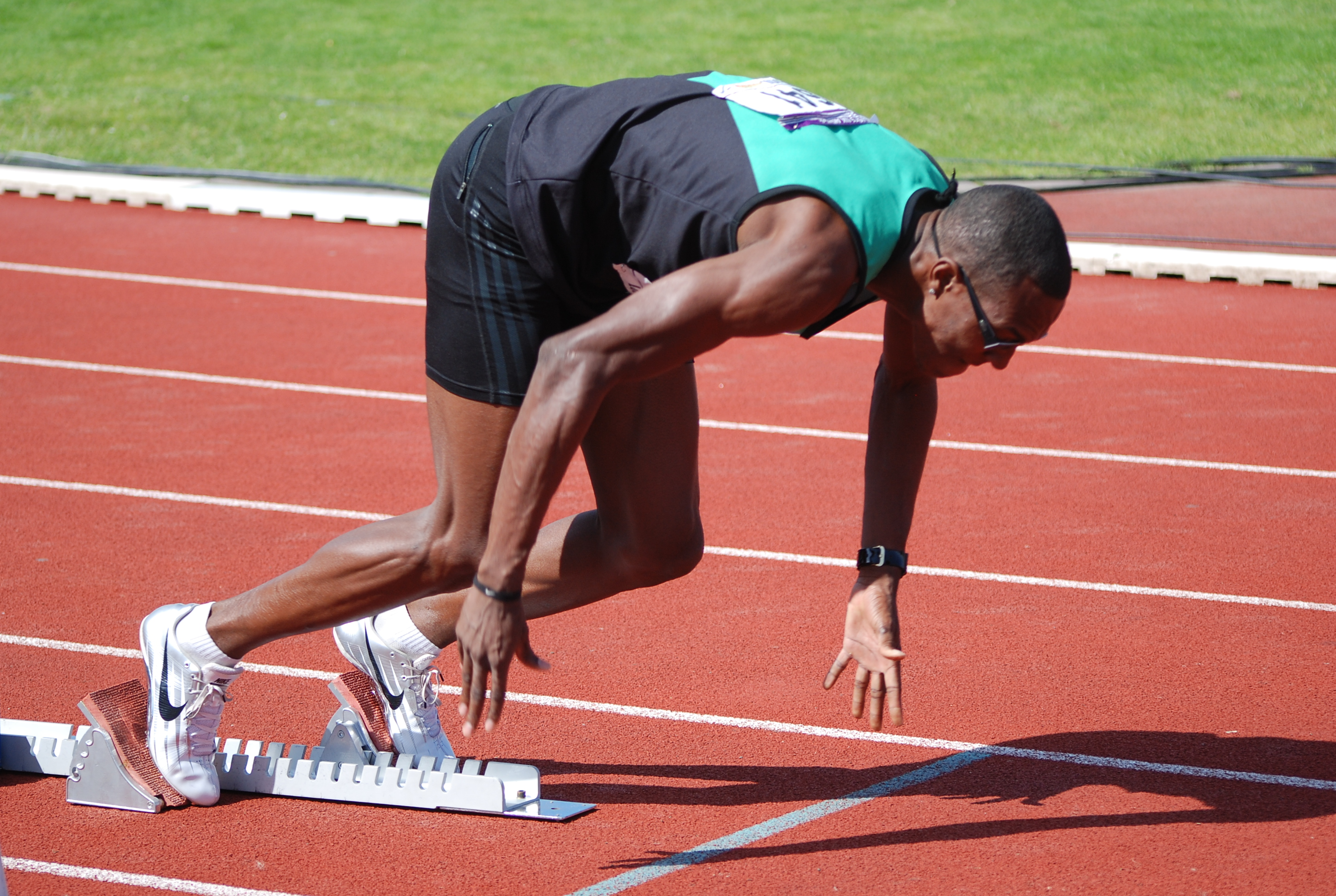 Liemarvin Bonevacia tijdens NK Atletiek 2012.